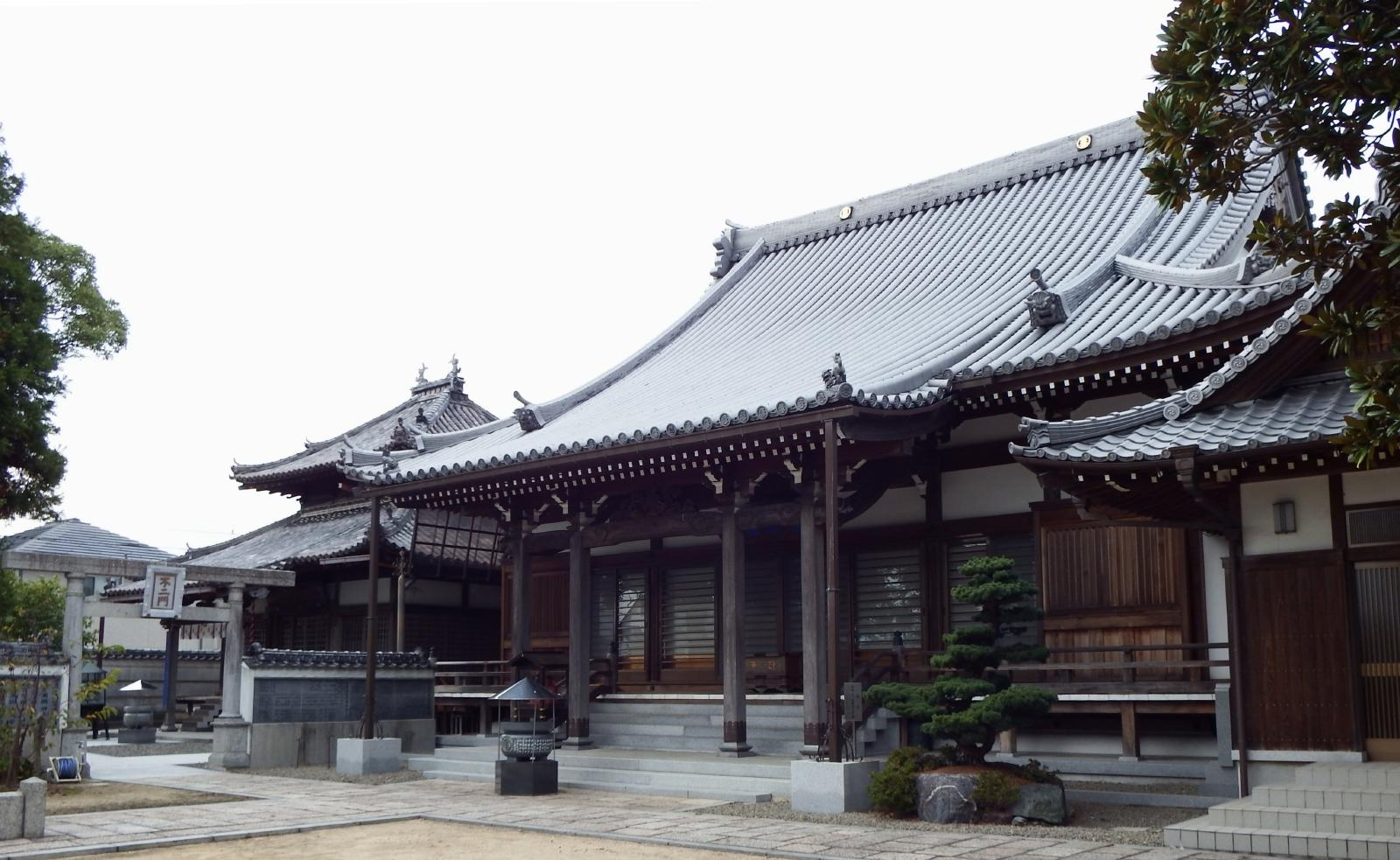 観音院の本堂（中）と観音護摩堂兼三寳大荒神王拝殿（左）